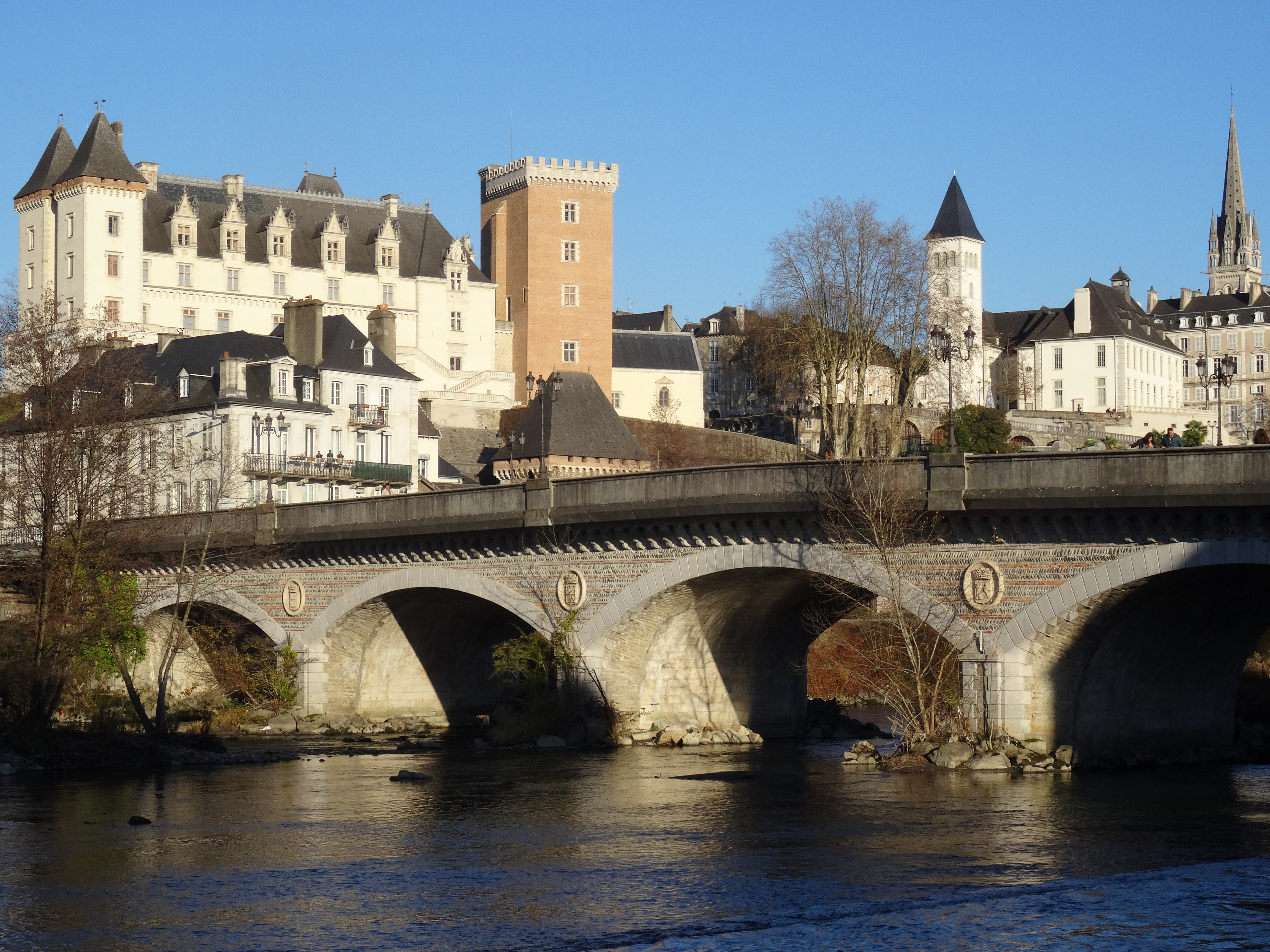 Le pont du XIV-Juillet à Pau, avec au deuxième plan le château de Pau, le Parlement de Navarre et l'église Saint-Martin.